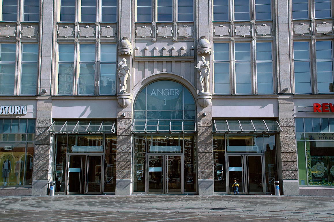 Hauptportal des Einkaufszentrums Anger 1, am Anger in Erfurt